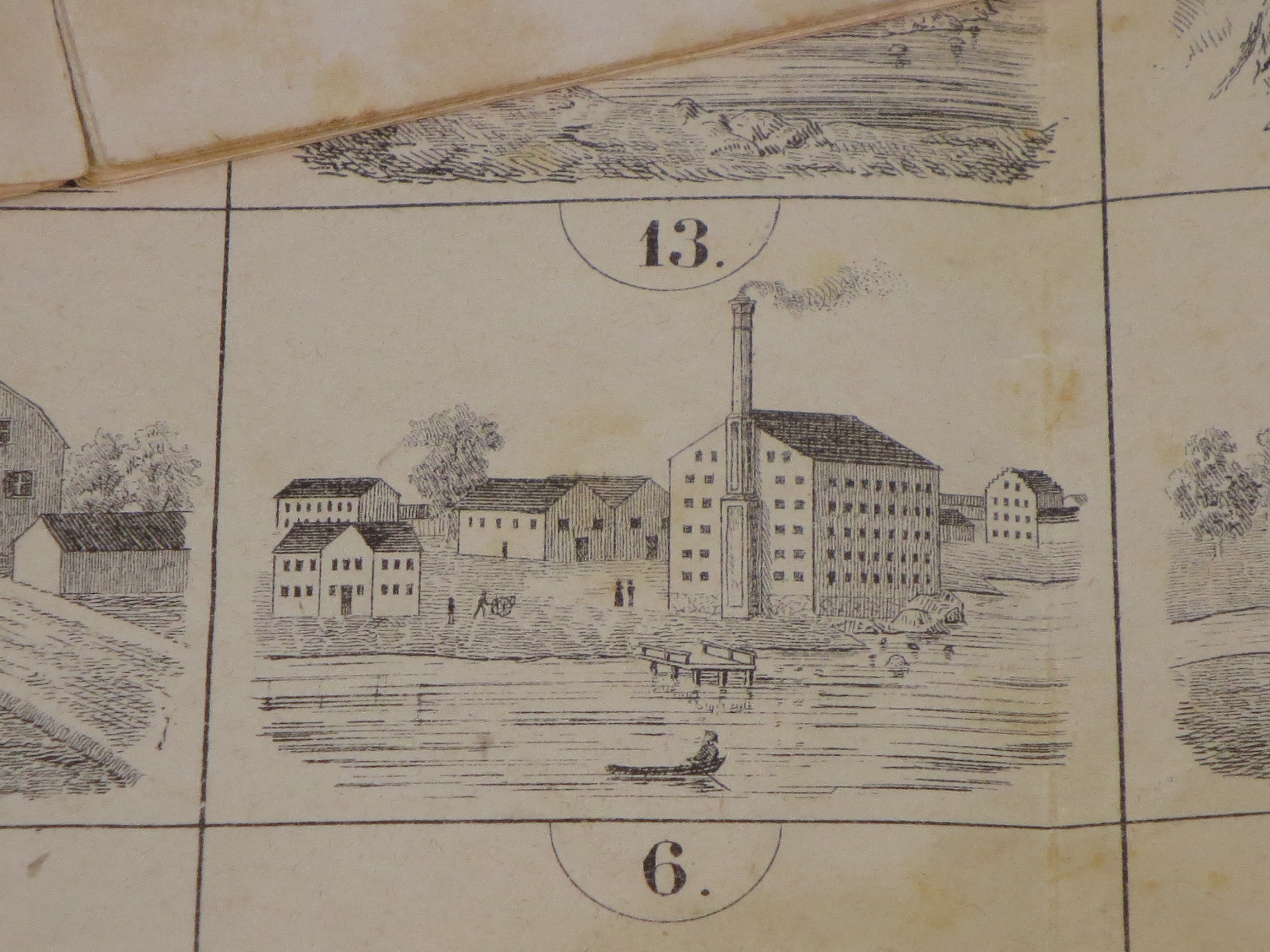 "Huvimatka Aavasaksaan" -pelin yksityiskohta. Peli on vuodelta 1862, joten tekijänoikeudet ovat vanhentuneet